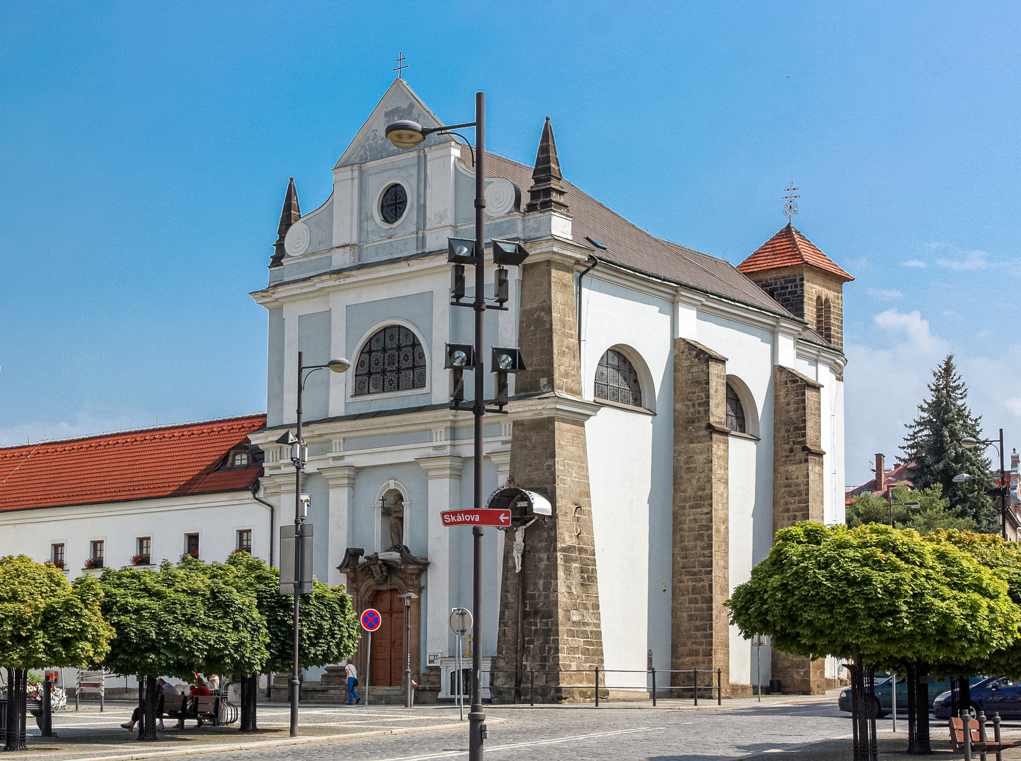 Turnov - kostel sv Františka z Assisi.